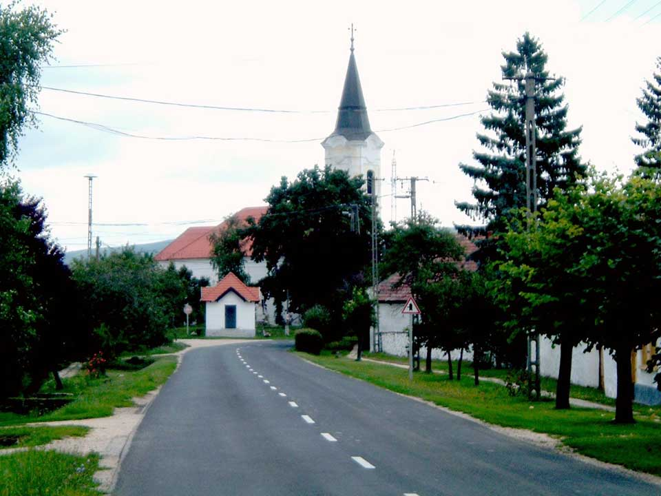 Bakonykoppány, Hungary - Szent Borbála római katolikus templom